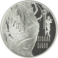 Монета За твором Лесі Українки `Лісова пісня` реверс